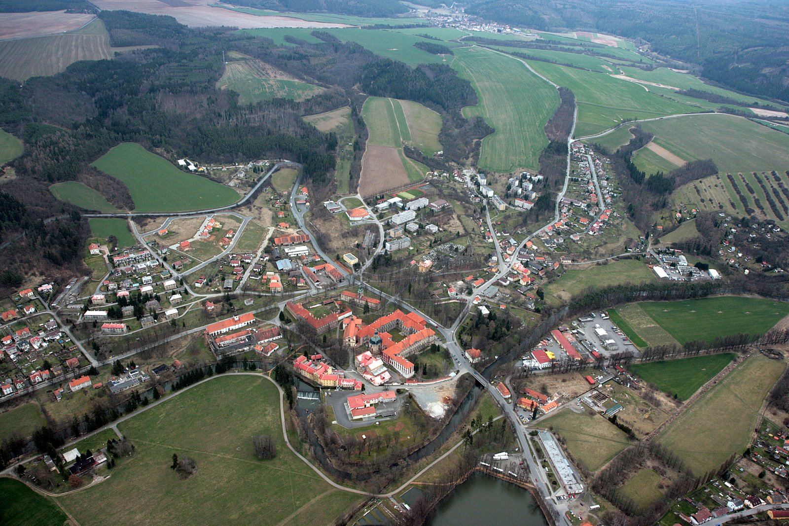 Část města Plasy na levém břehu Střely protnutá silnicí 27. Ve středu areál cisterciáckého kláštera, vlevo v popředí Velká louka, vpravo na pravém břehu chráněná Alej vzdechů a uprostřed v pozadí ves Babina.